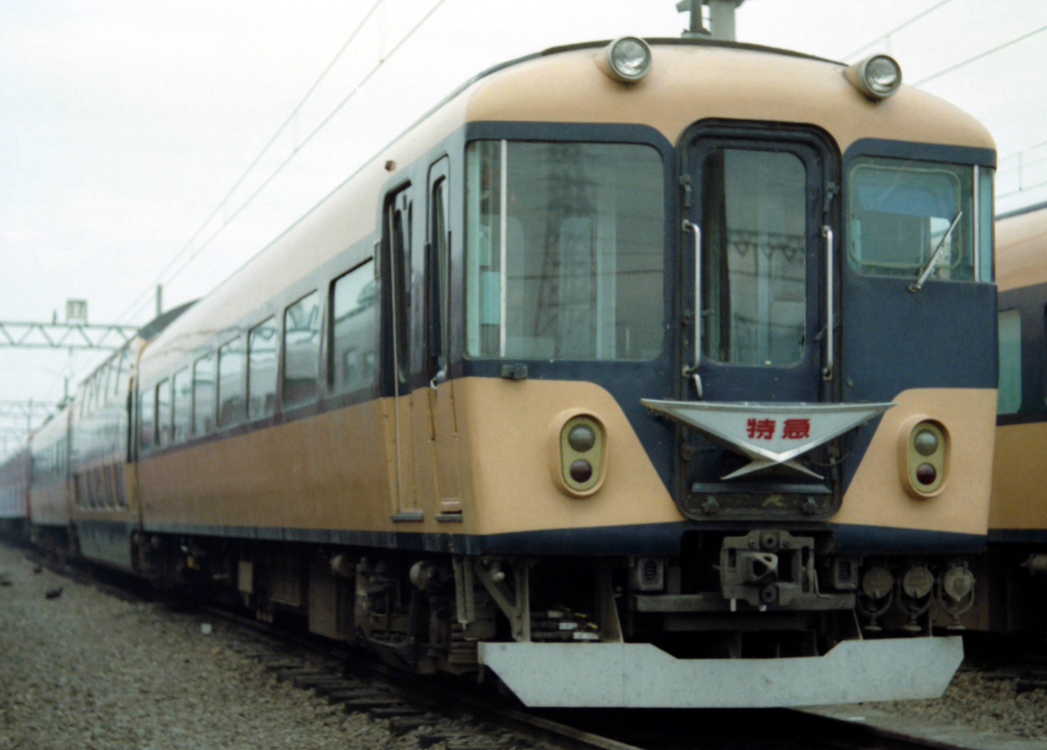 近鉄 １０１００（Ｃ） 高安車庫